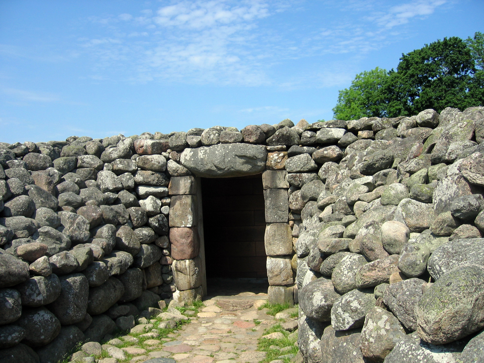 Kivik Kungagraven Foto: Fantomen 16 juni 2006